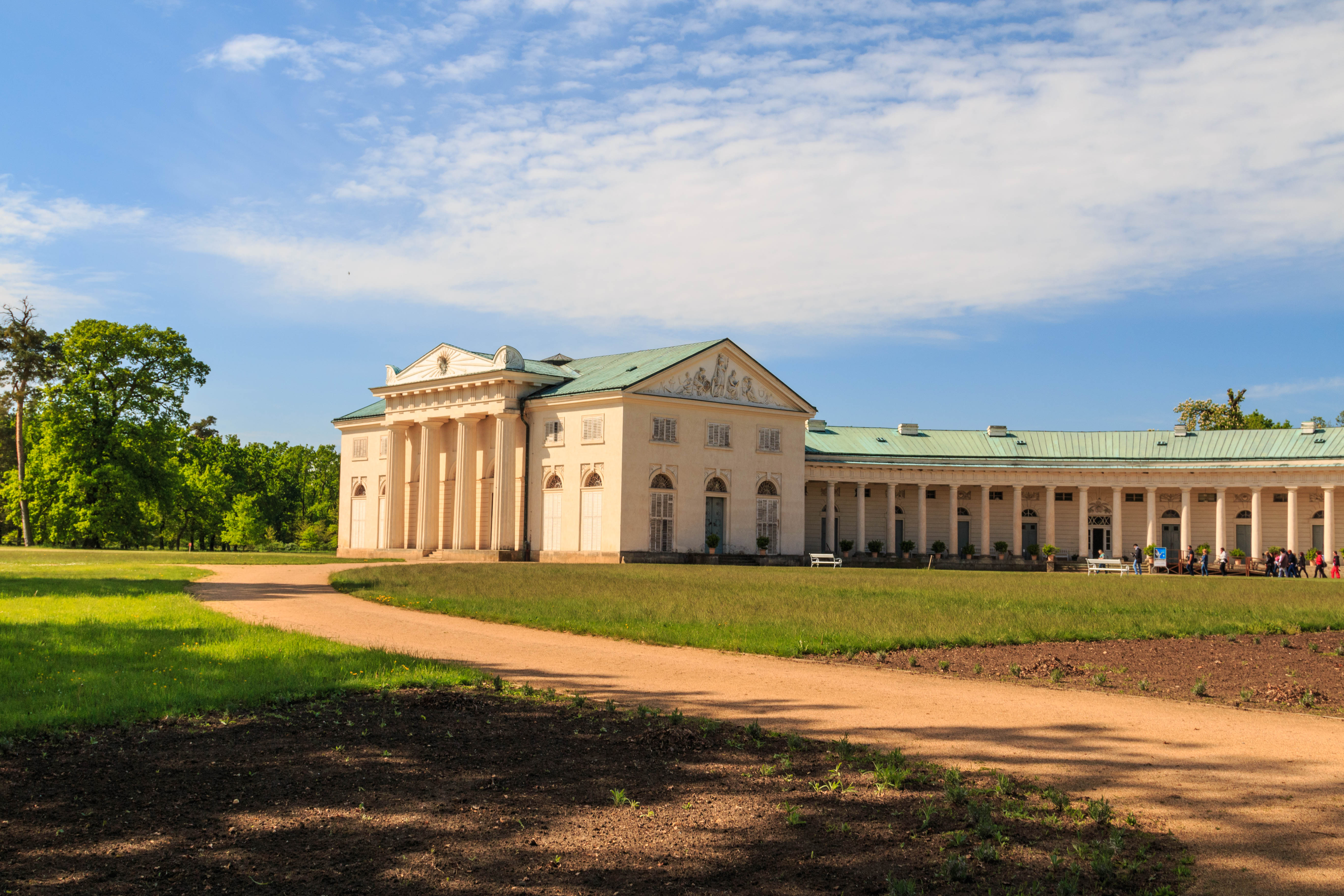 Zámek Kačina, Svatý Mikuláš 51, Svatý Mikuláš (okres Kutná Hora).